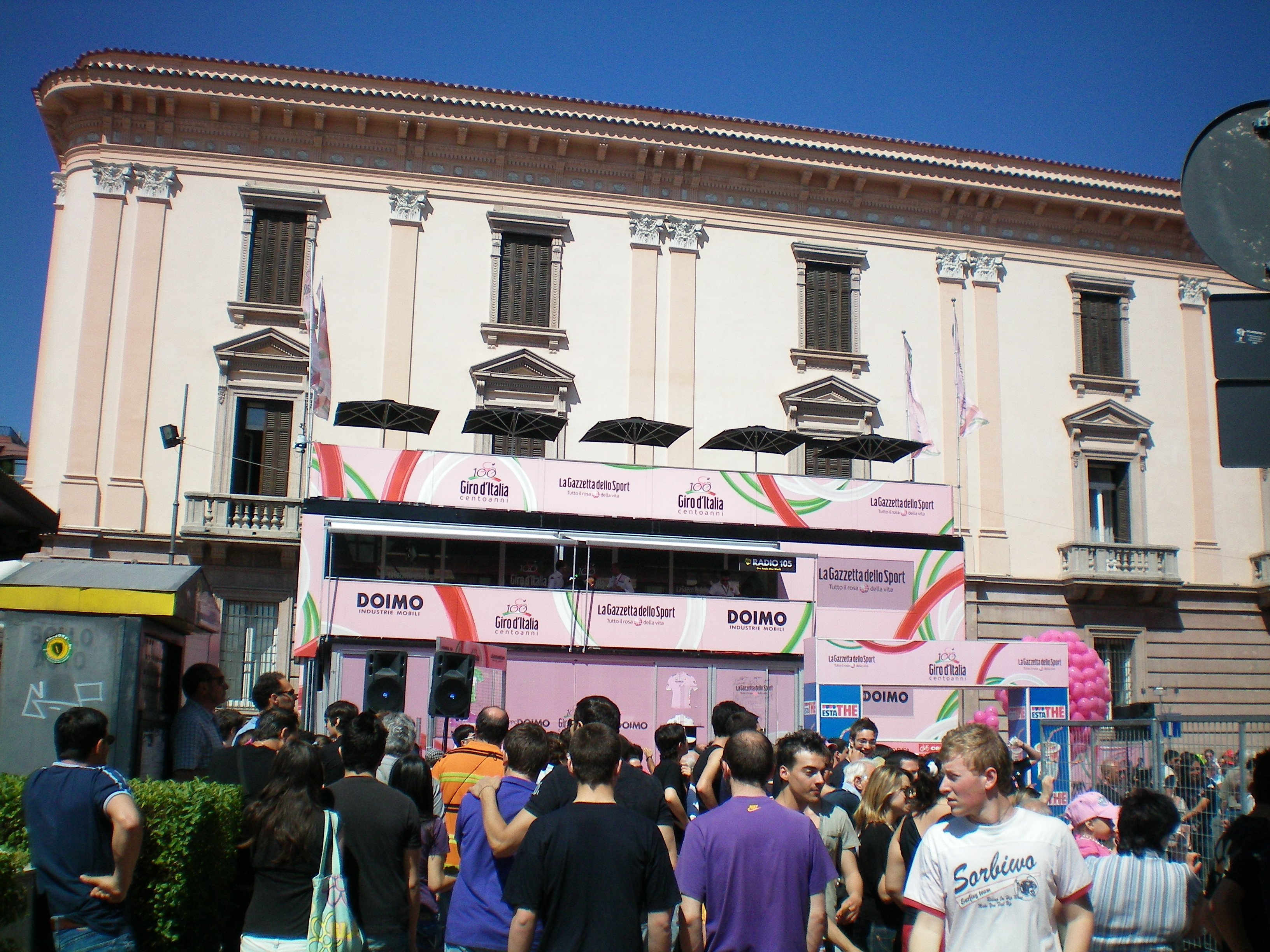 Palazzo della provincia